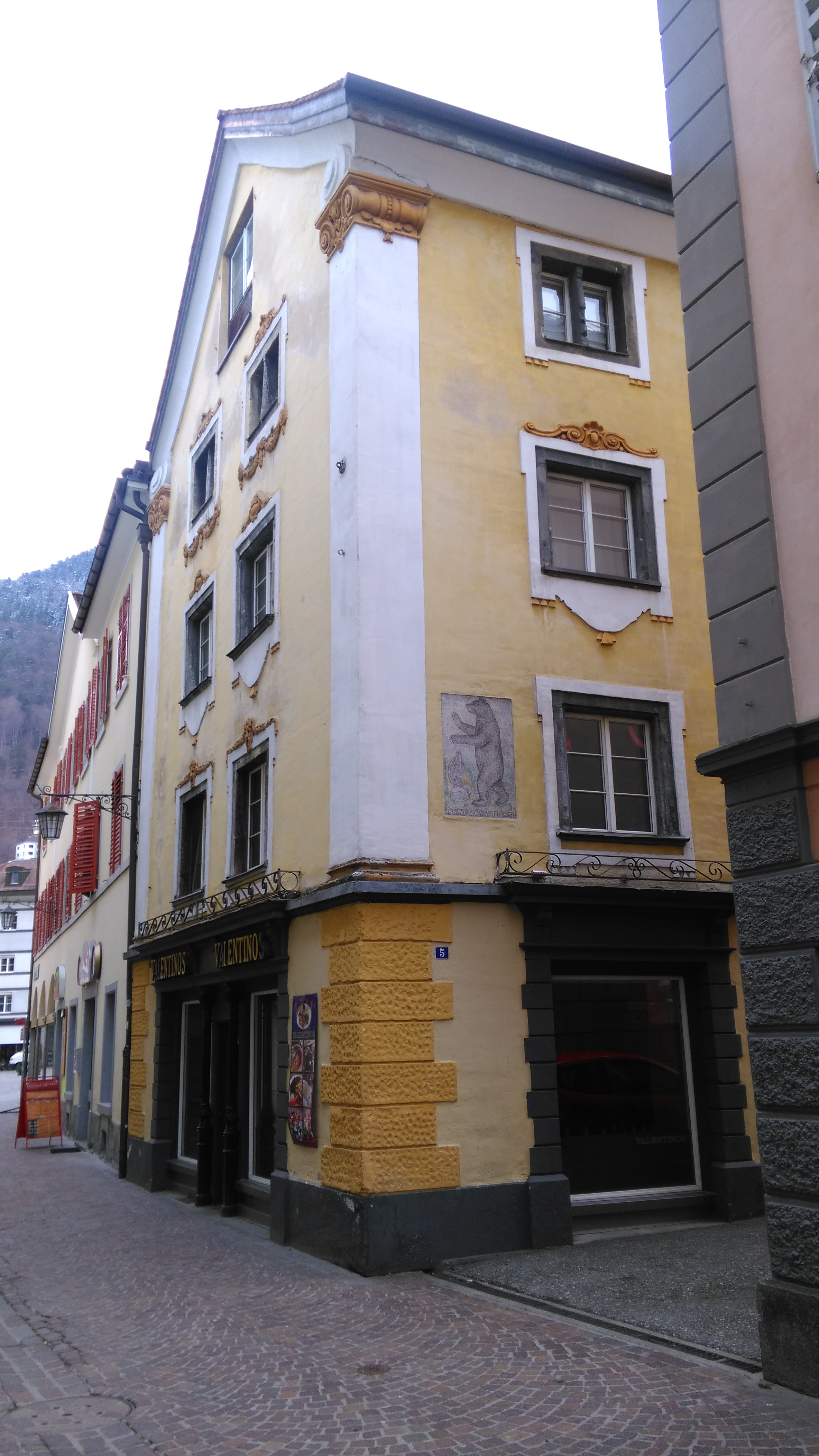 Rumantsch: Chasa tar l'Urs nair en la citad veglia da Cuira. 1899 cumprada tras Otto Hürsch-Müller e fabritgada enturn per pudair indrizzar ina pasternaria electrica en questa chasa.